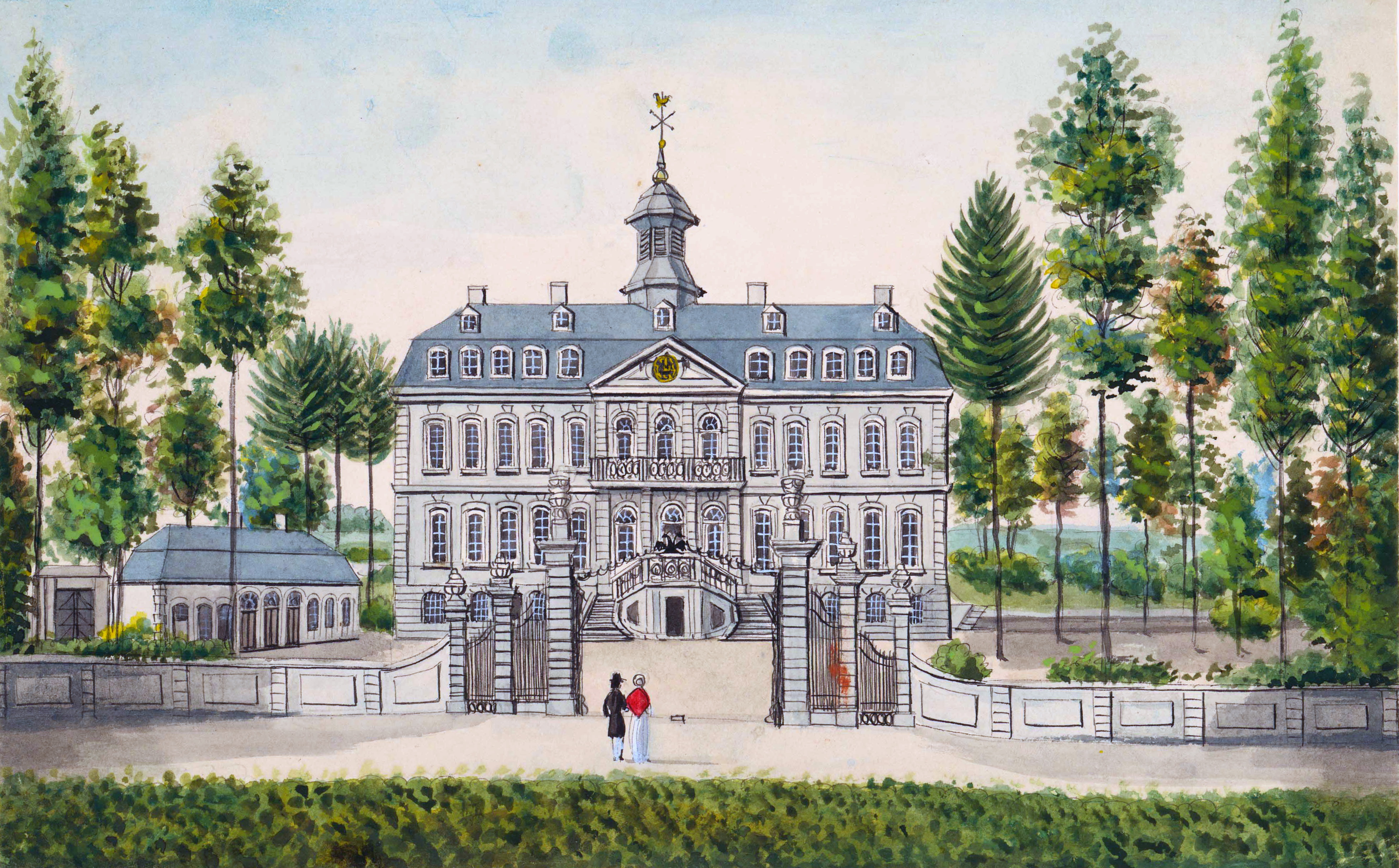 Tekening van Philippe van Gulpen van Huis Blumenthal (Kasteel Bloemendal) in Vaals. Collectie van der Noordaa in het RHCL, Maastricht, CVDN 225.